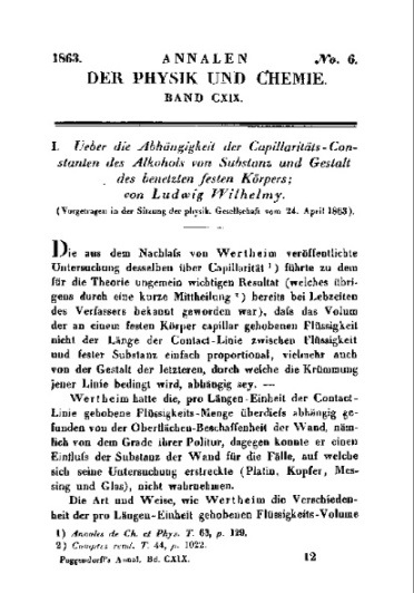 Couverture Annalen der Physik